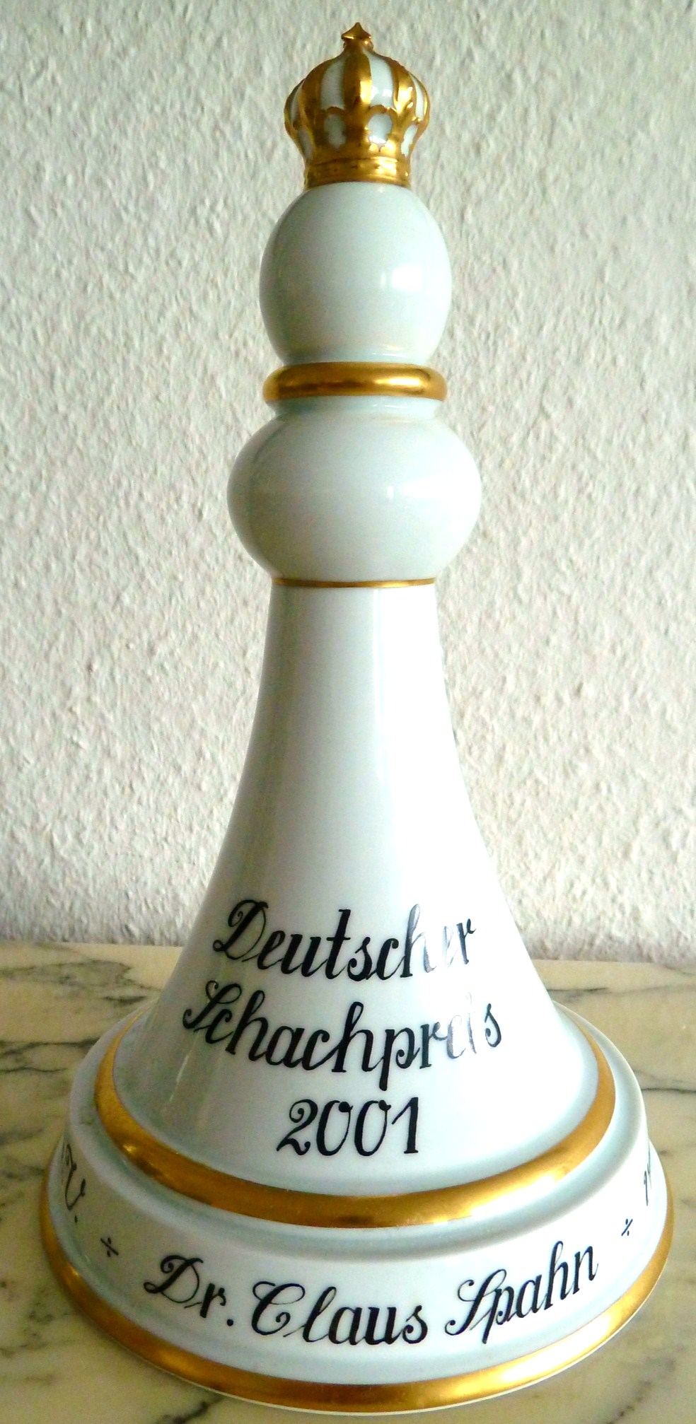 Deutscher Schachpreis 2001, verliehen vom Deutschen Schachbund an Dr. Claus Spahn am 12. Juli 2001 in Dortmund.